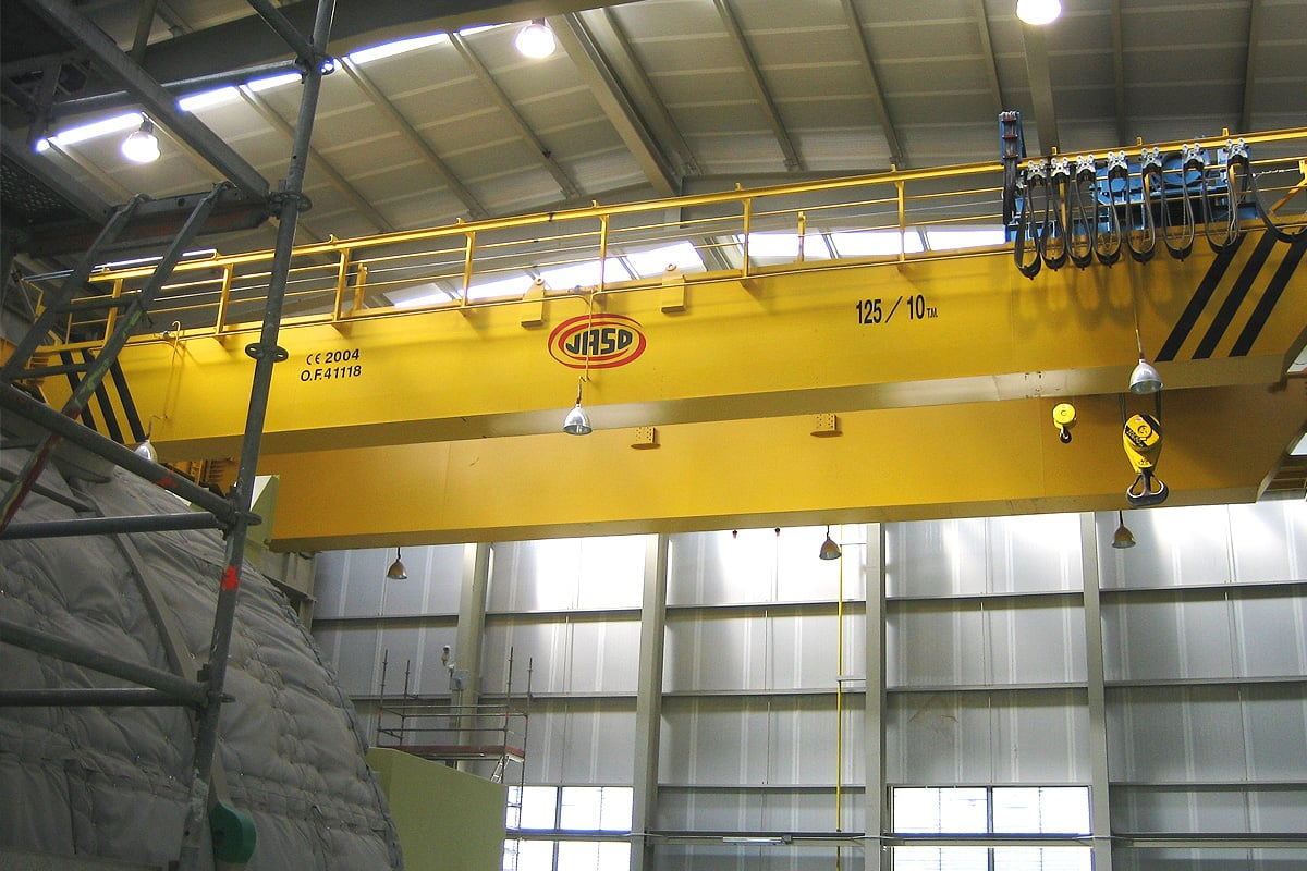 Puente Grúa de sector energía, utilizado en Planta de Generación Eléctrica para montaje y mantenimiento de las turbinas de generación